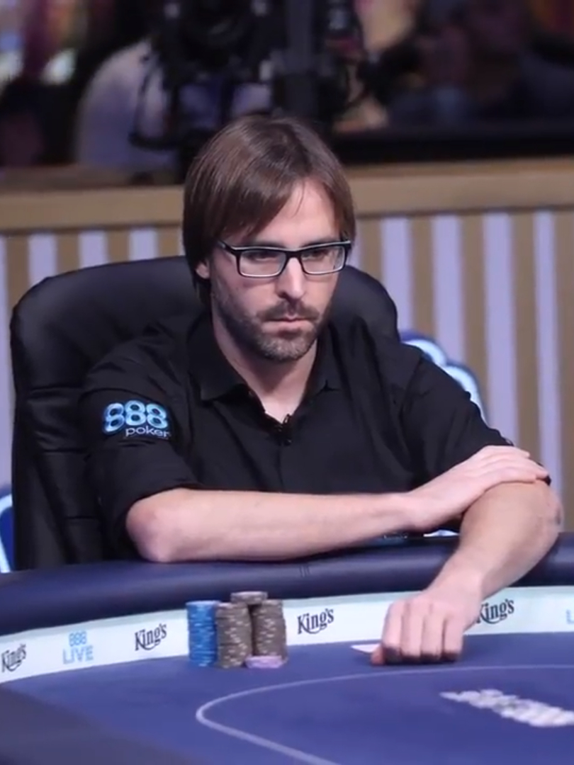 Martí Roca de Torres am Finaltisch des WSOPE-Main-Events 2017